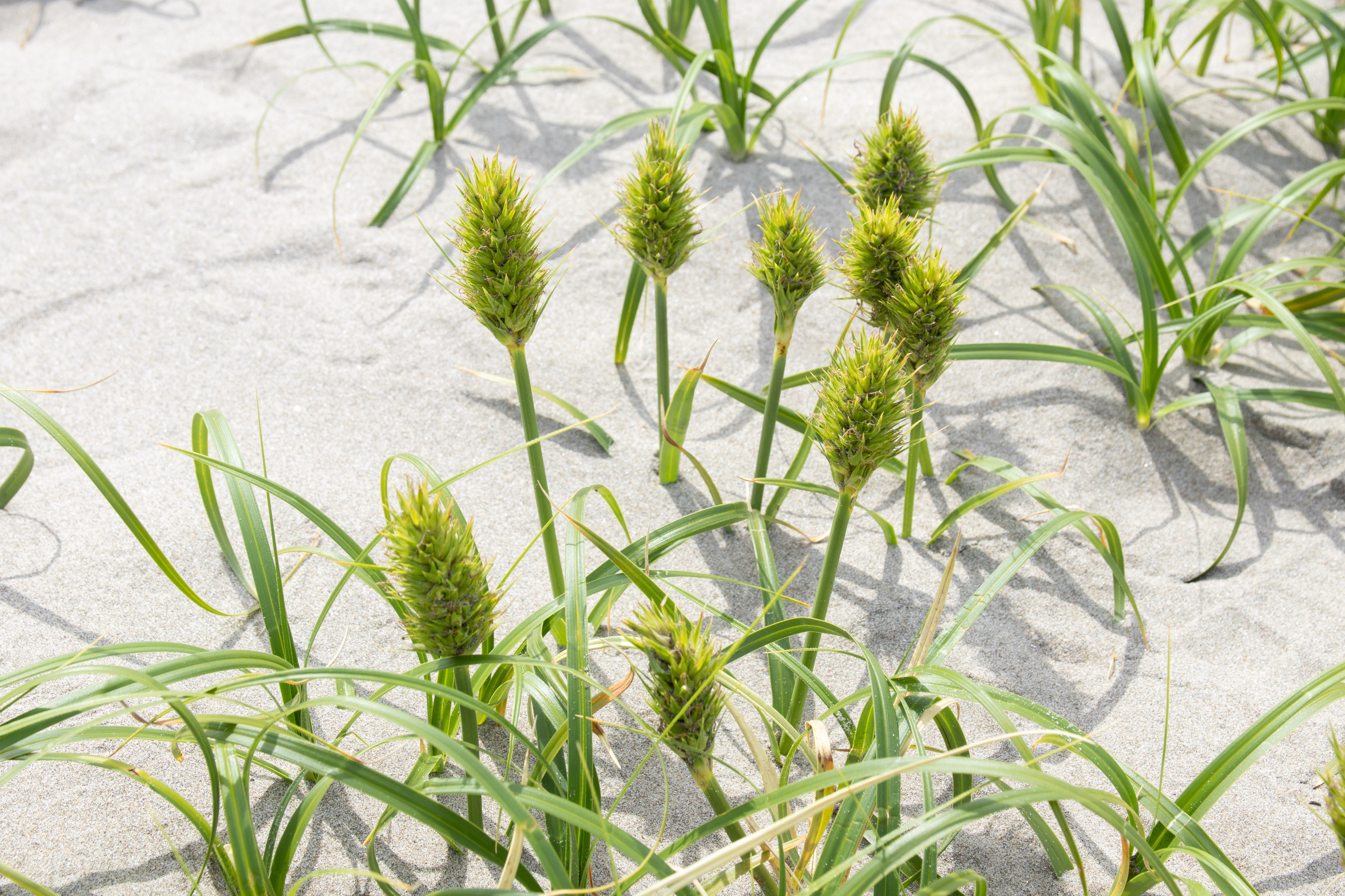 コウボウムギ (学名:Carex kobomugi) 撮影地：波崎海岸（茨城県神栖市） Canon EOS 80D + Sigma 17-70mm F2.8-4 DC Macro OS HSM